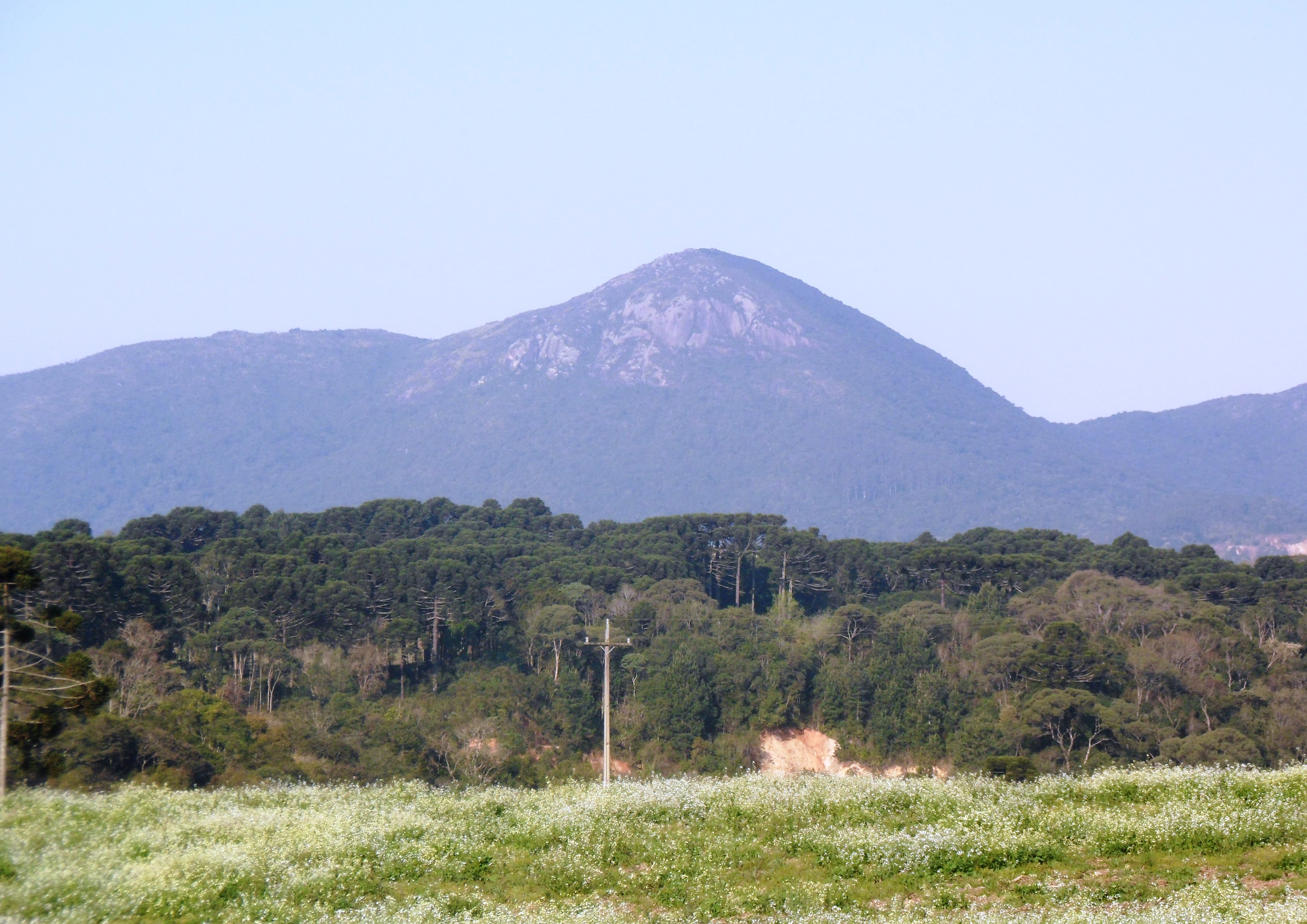 Morro do Anhangava, ponto culminante do município de Quatro Barras.